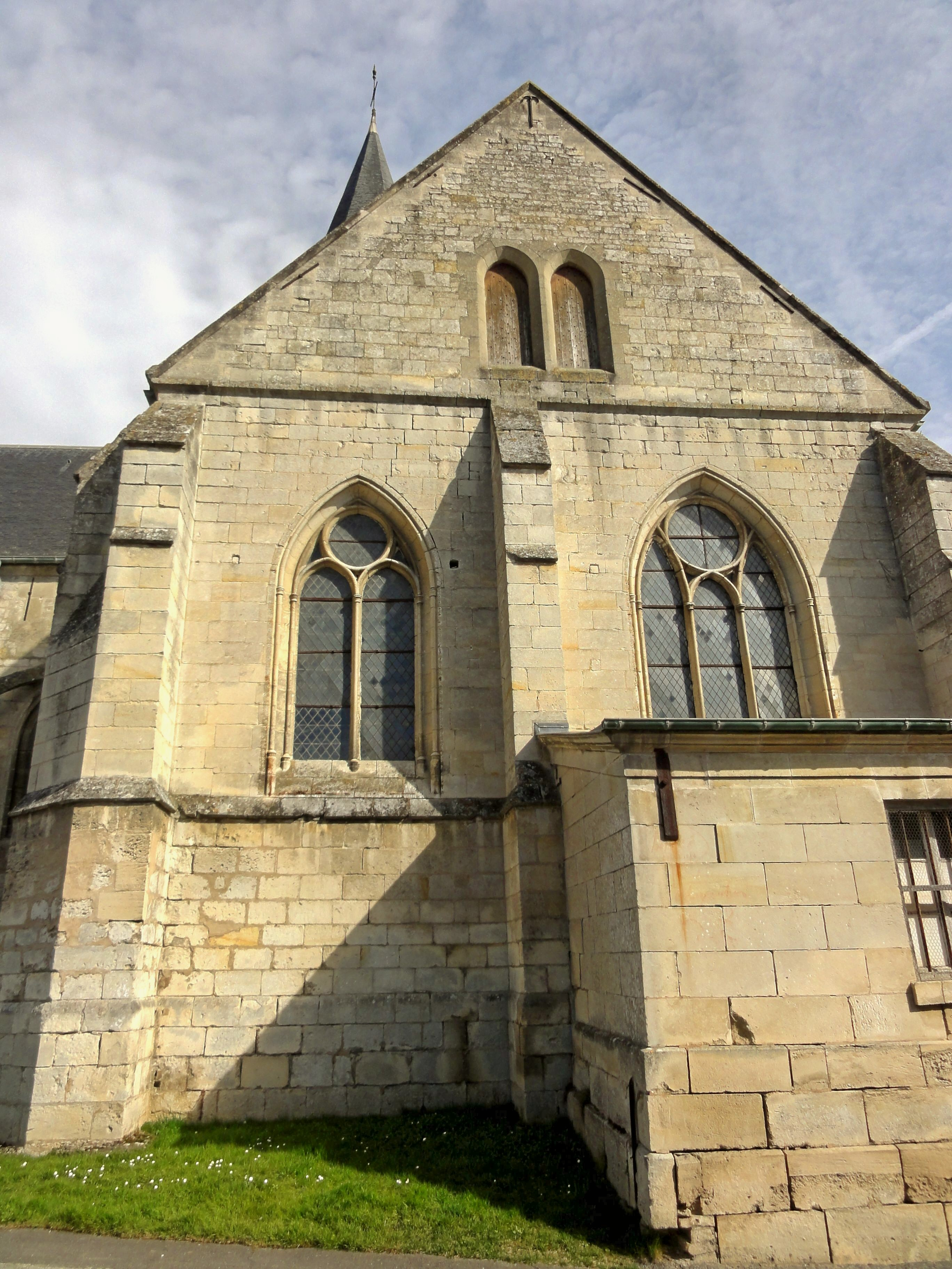 Vue sur le chœur-halle depuis le sud. Ces deux travées sont contemporaines et stylistiquement homogènes, mais pas identiques.